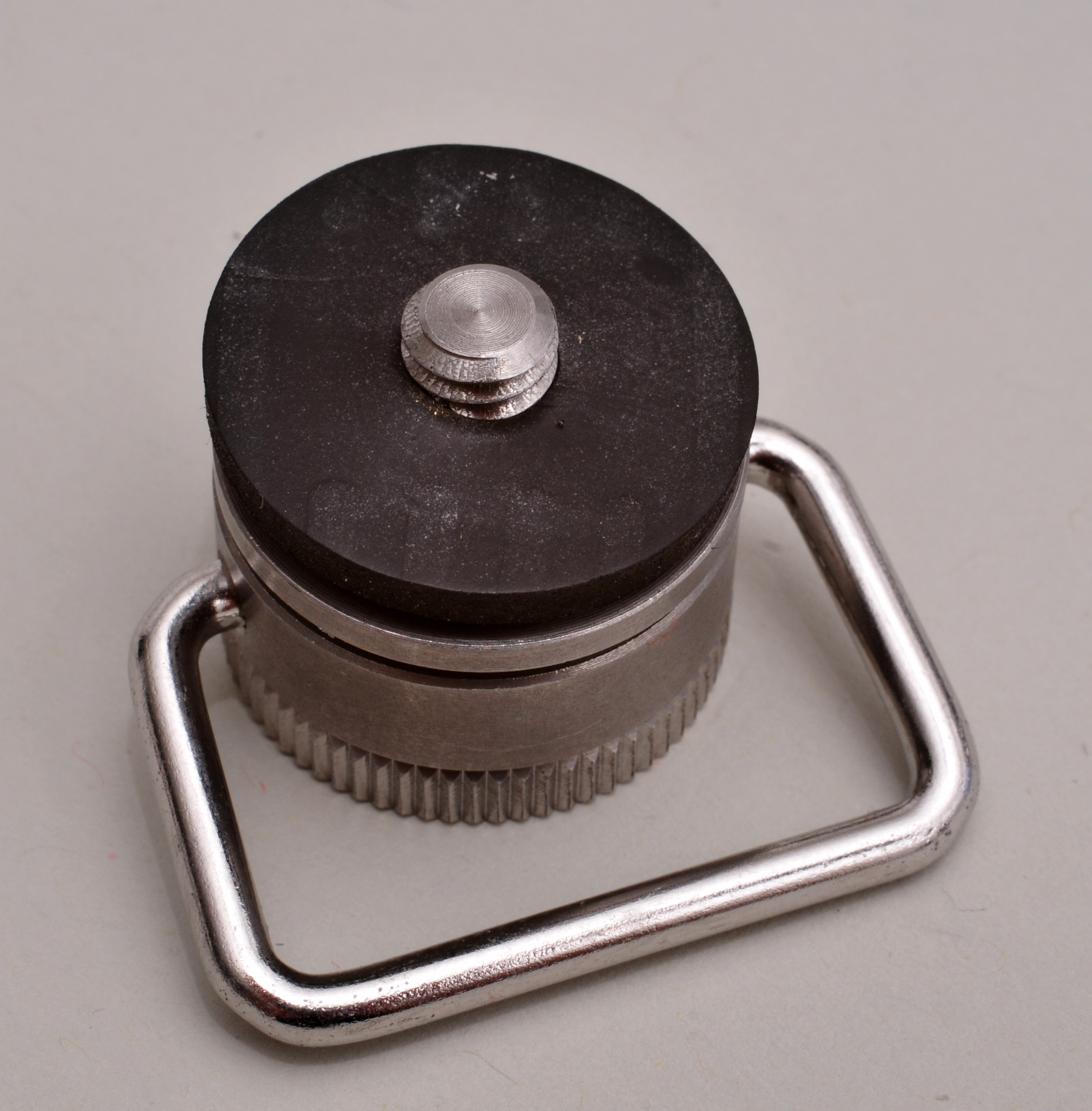 Inventur der Blitzanlage Wikimedia Deutschland. Das Bild zeigt die DIN-4503-Stativgewindeschraube eines Kameragurtes.)